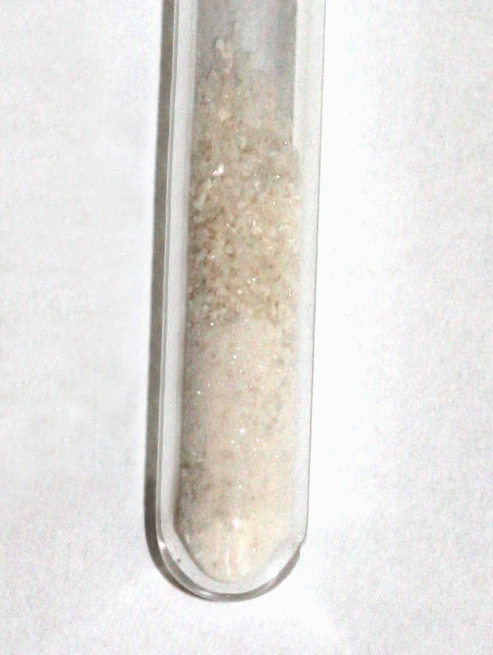 500 mg selbst hergestellter Brechweinstein